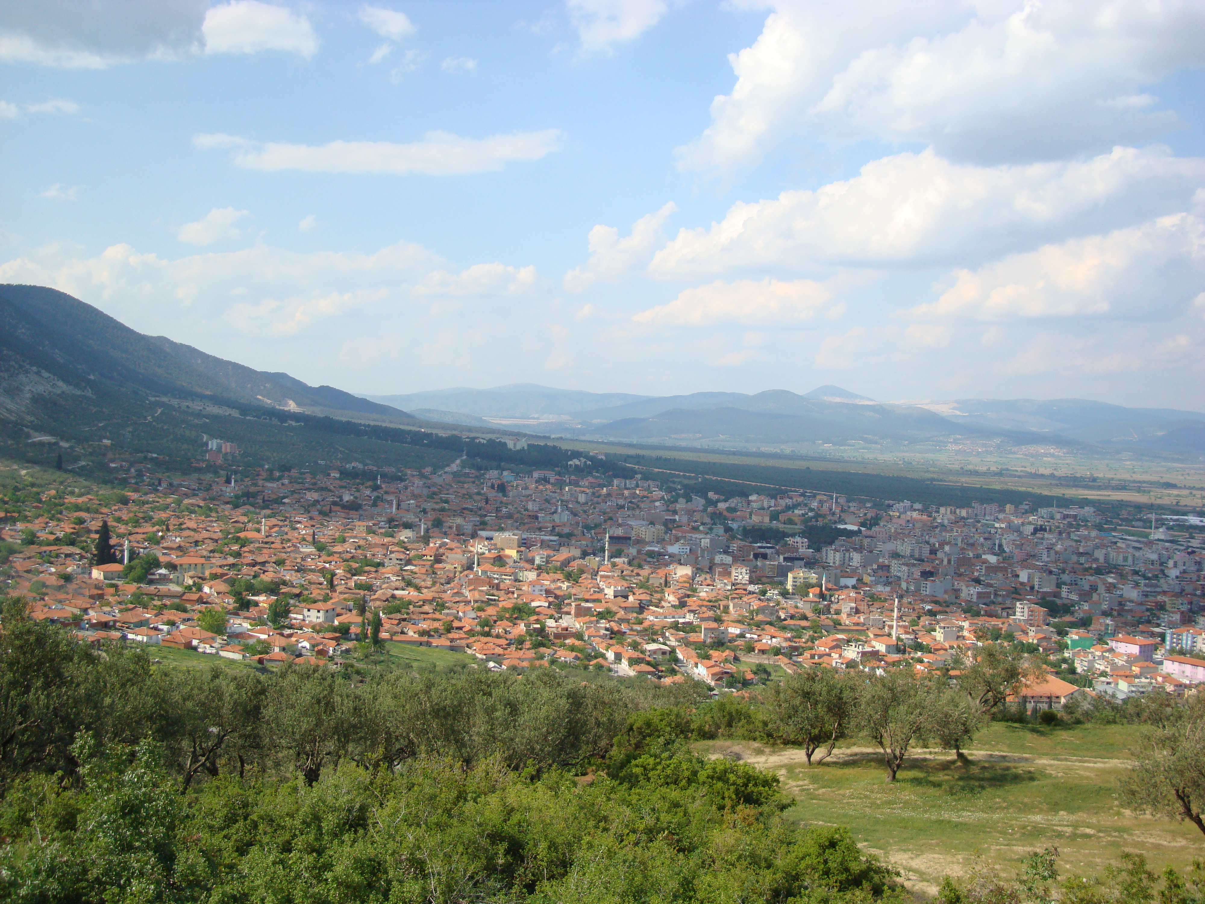 Kırkağaç